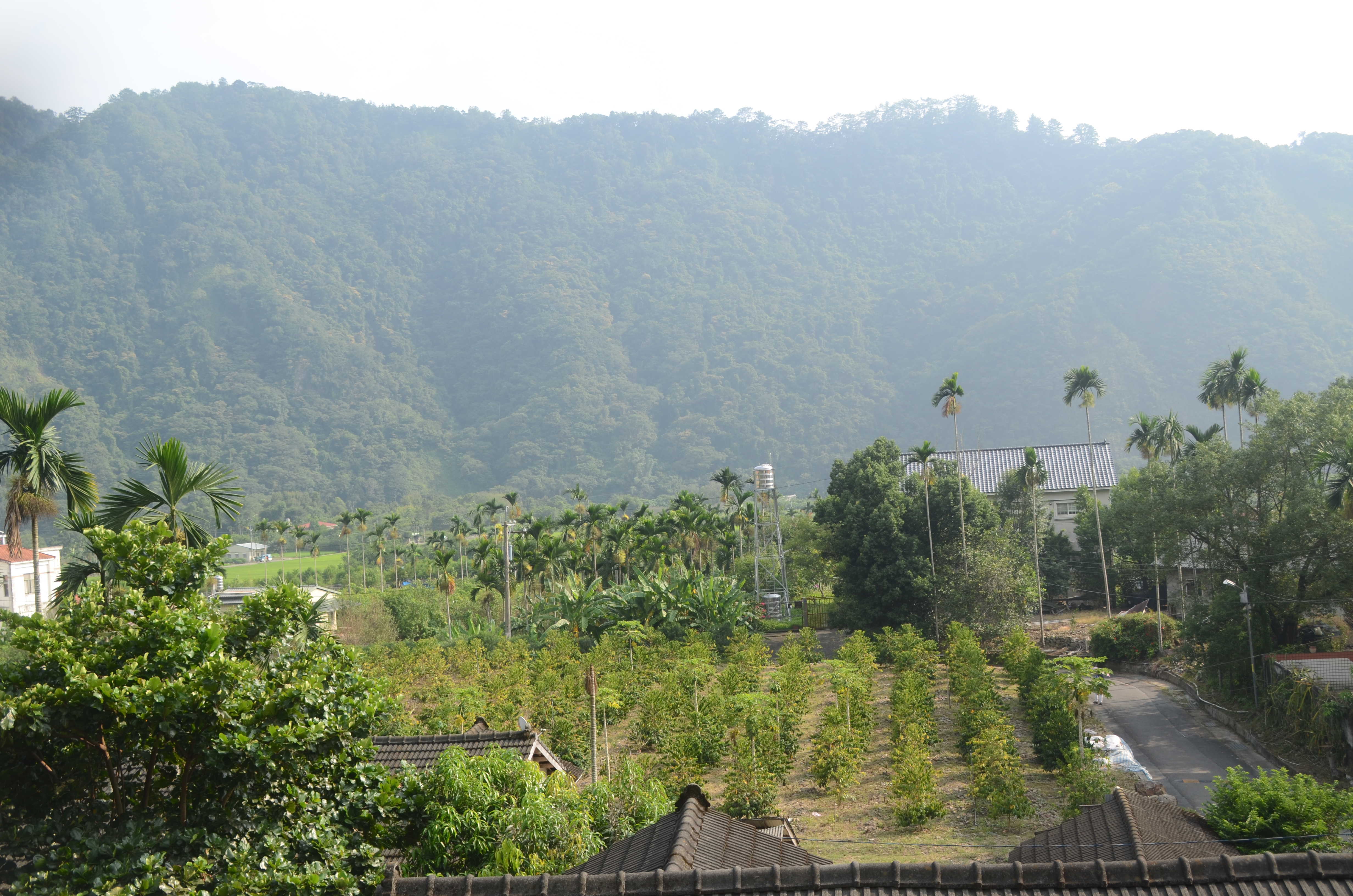 中文（台灣）: 霧社事件餘生紀念館用以紀念霧社事件的始末，與紀錄先民的遷徙歷史，於921後興建完成。